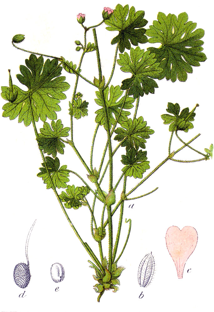 Geranium molle L. Original Caption Weiches Geranium, Geranium molle